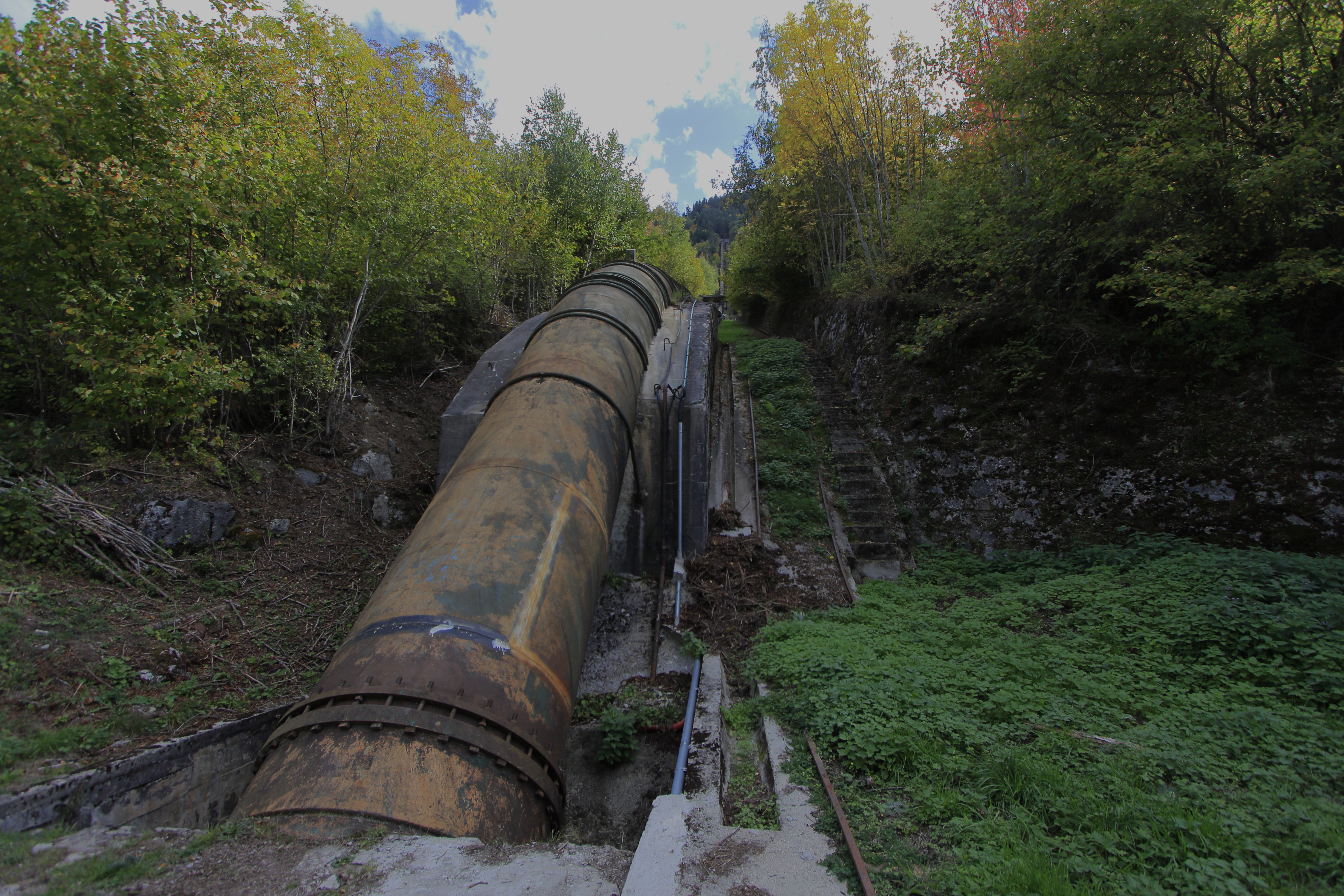 Tram final canonada forçada de la Central Hidroelèctrica d'Aiguamoix. A la seva dreta les vies del funicular cobertes de vegetació i les escales